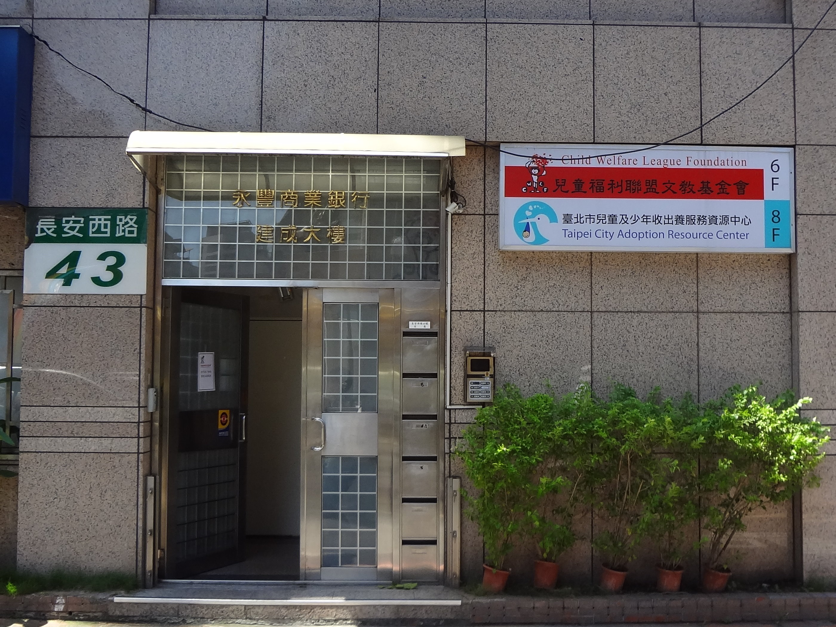 中文（台灣）: 永豐商業銀行建成大樓，位於臺北市大同區長安西路43號。永豐商業銀行建成分行設於1至2樓，兒童福利聯盟文教基金會總部設於6樓。